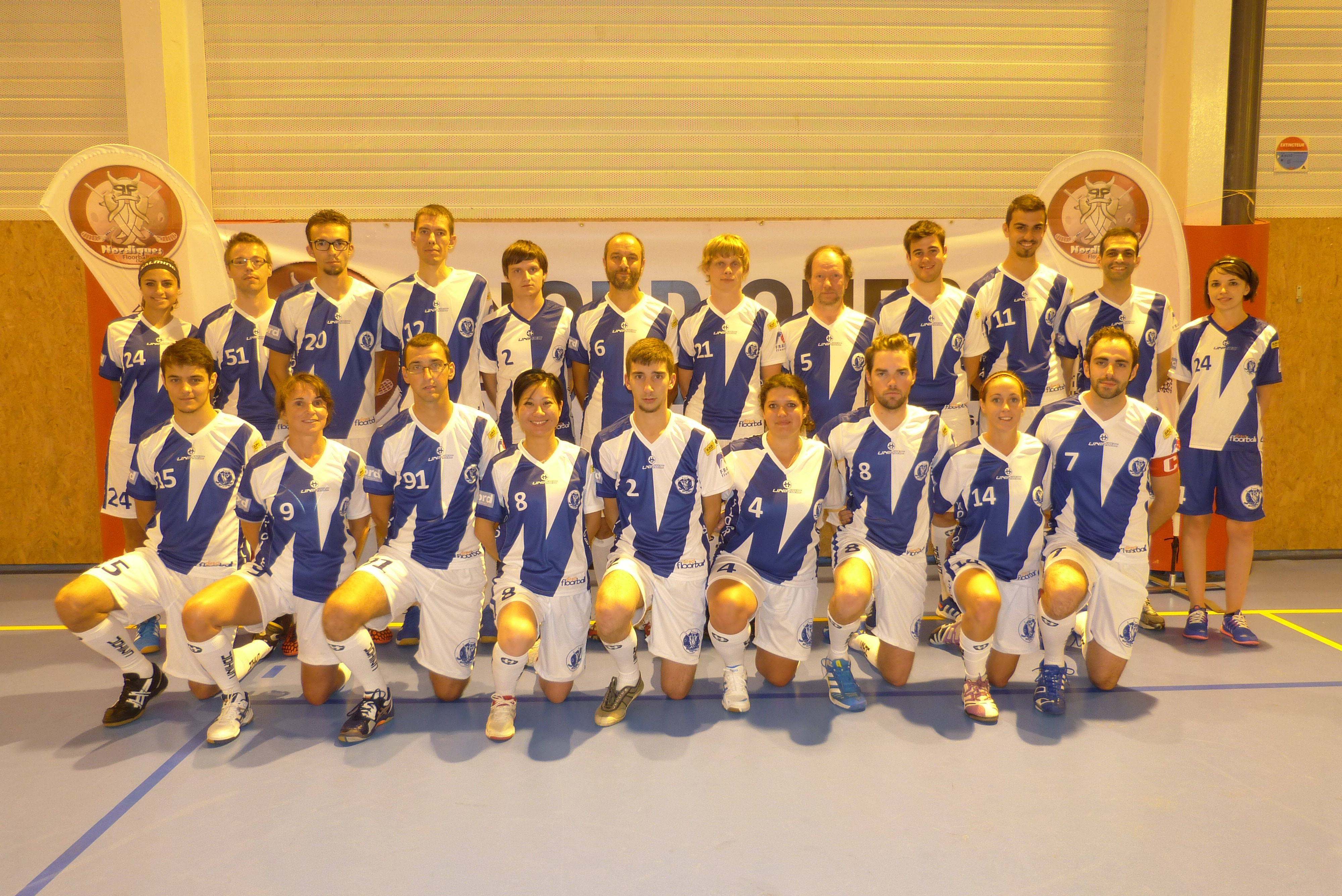 NFCT 2014